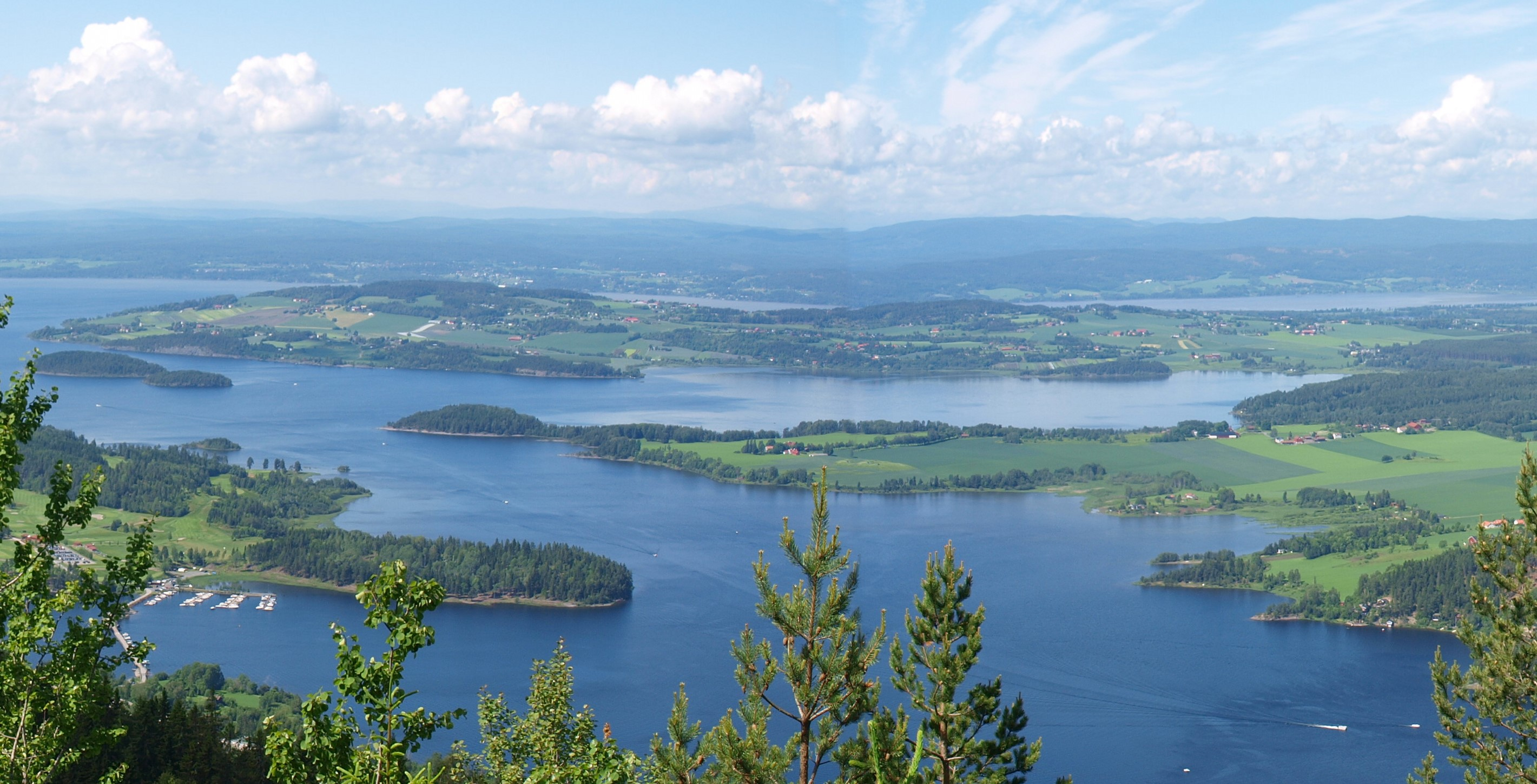 Storøysundet–Sælabonn naturreservat i Tyrifjorden, sett fra Kongens utsikt på Krokskogen